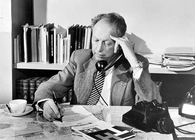 Dr. C.H. van der Leeuw was in 1946 Curator van de Technische Hogeschool Delft, en van 1953-1960 President-Curator.